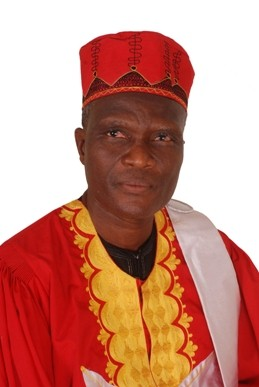 Vice Recteur chargé des Affaires Académiques et de la Recherche Universitaire